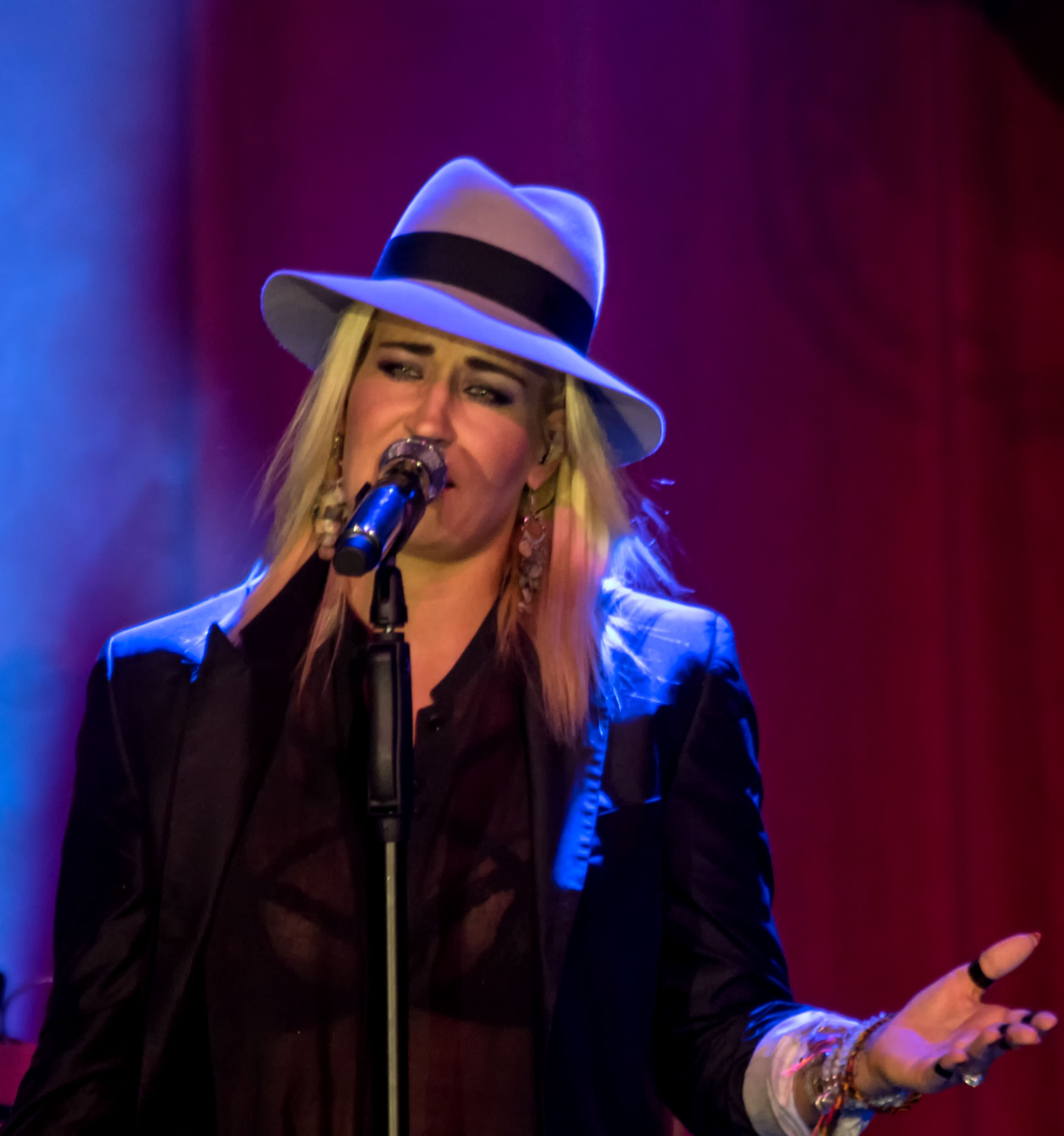 Bilder vom Zelt Musik Festival 2016 in Freiburg im Breisgau Sarah Connor